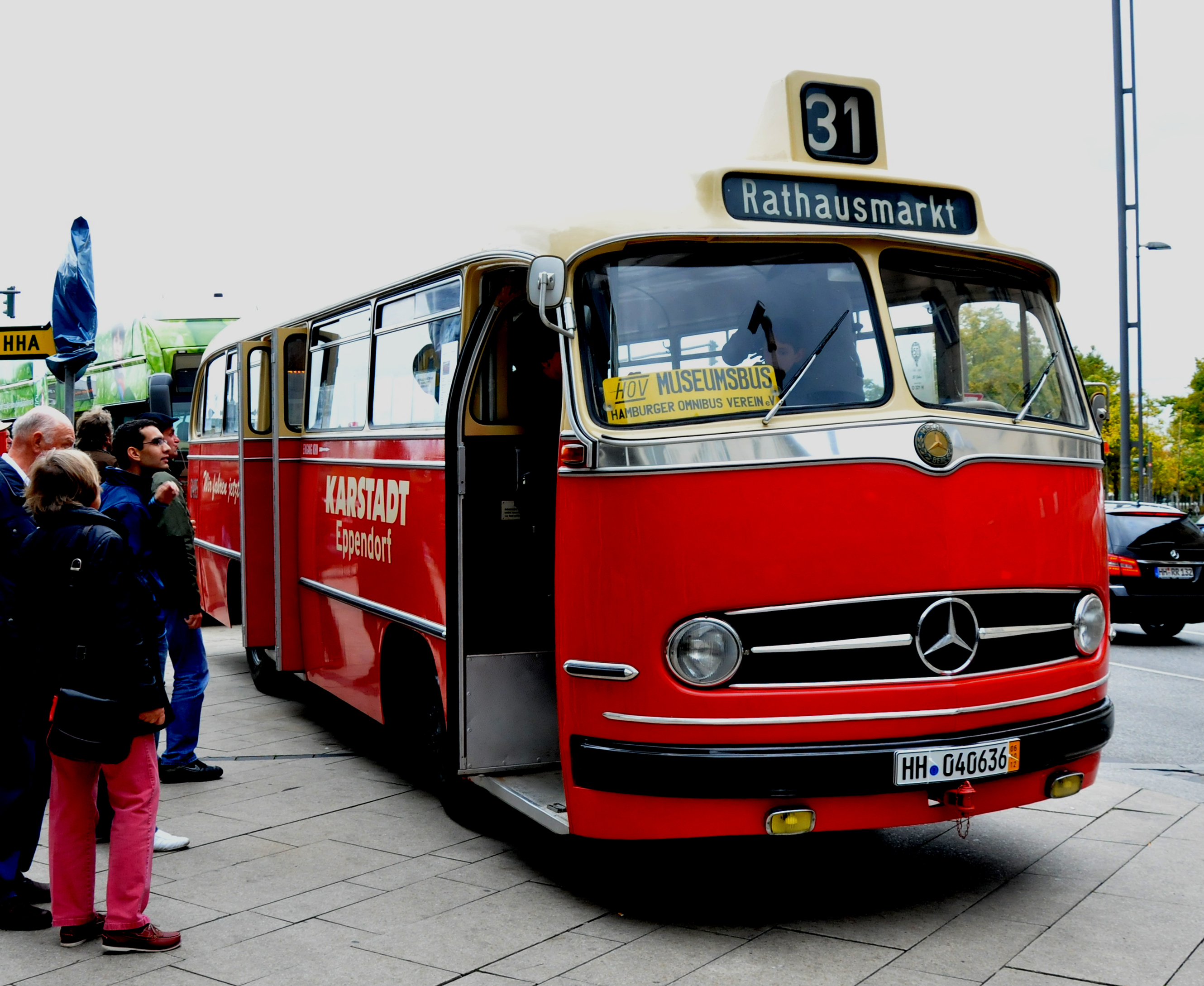 Hamburger Hochbahn-Stadtbus 6495 (ex 264) van het type Mercedes-Benz O321H (1. Serie), Baujahr: 1955 tijdens parade te Jungfernstieg. [1]